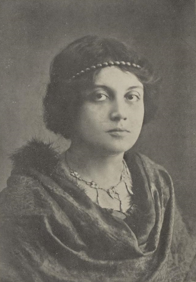 Anna Beata Henriëtte Alexandrine (Beata) van Helsdingen-Schoevers (1886-1920)